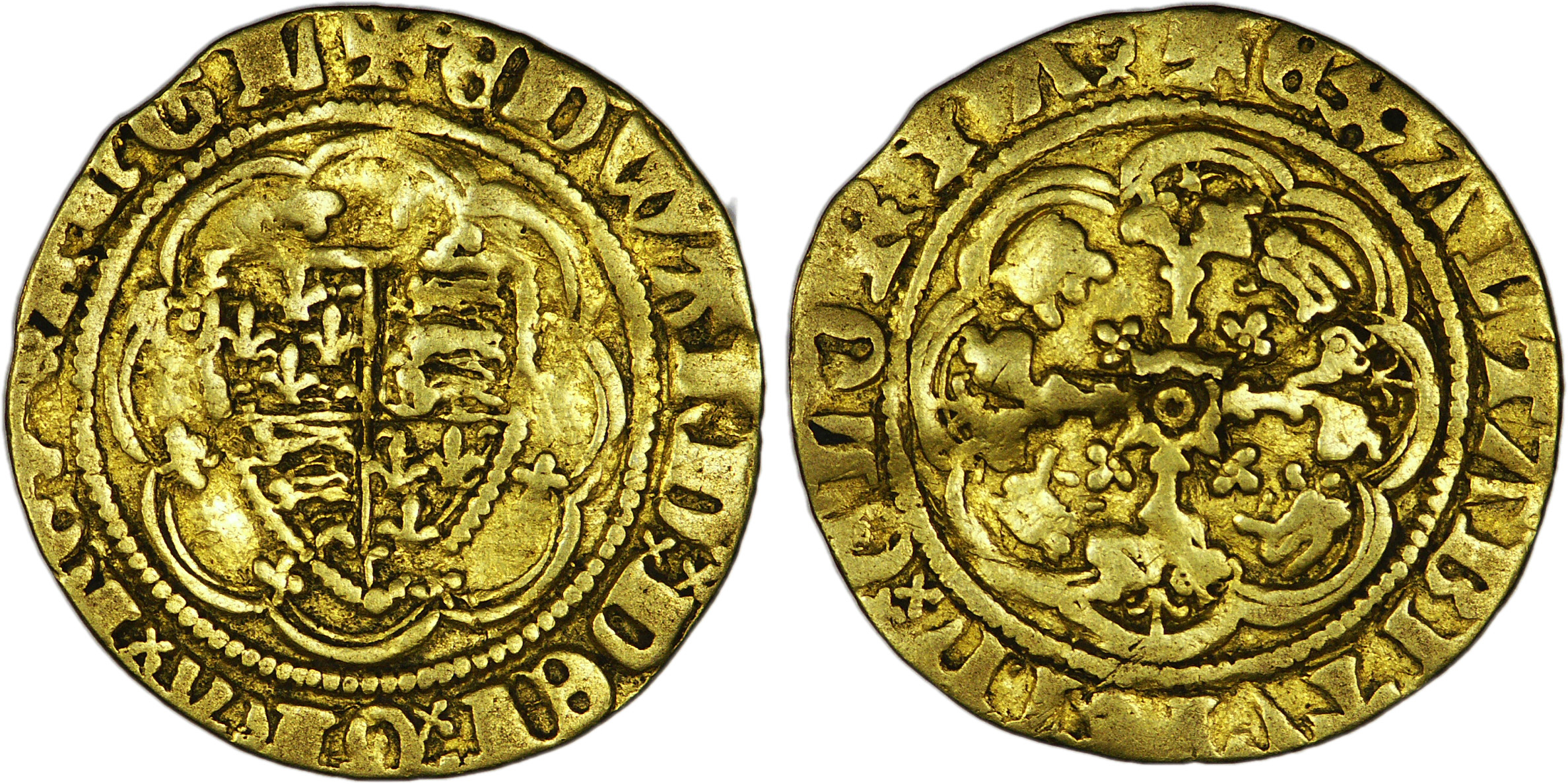 Nom de l'atelier/ville : Calais Métal : or Diamètre : 18,5mm Axe des coins : 3h. Poids : 1,67g. Titulature avers : + EDWARDx DEIx GRAx REXx AnGL, (ponctuation par deux sautoirs superposés). Description avers : Écu écartelé aux 1 et 4 de France, aux 2 et 3 d’Angleterre. Traduction avers : (Édouard, par la grâce de Dieu, roi d’Angleterre). Titulature revers : + EXALTABITV[R]x Inx GLORIAx. Description revers : Croix feuillue et fleurdelisée portant en cœur un quadrilobe anglé contenant un annelet, cantonnée de quatre léopards couronnés ; le tout dans un double octolobe cantonné de huit petits trèfles. Traduction revers : (Il sera exalté dans la gloire). Fabrication date: 1361-1369